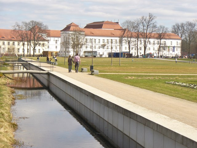 Schlosspark Oranienburg - Graben